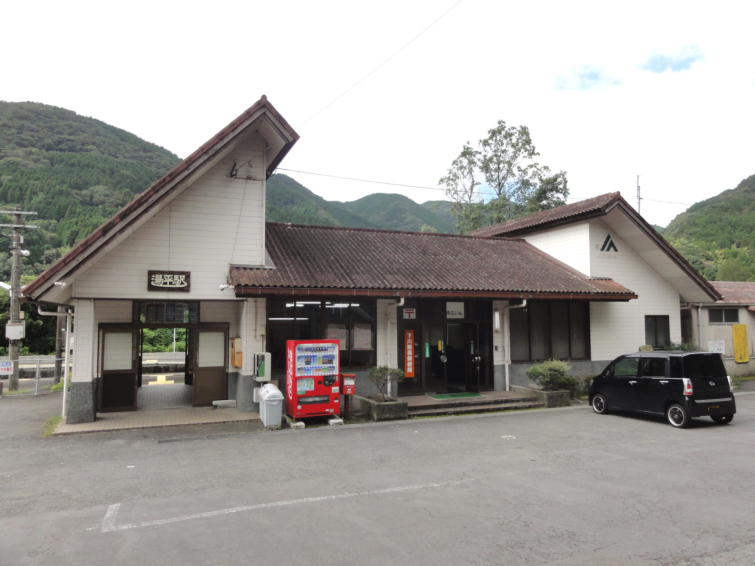 湯平駅